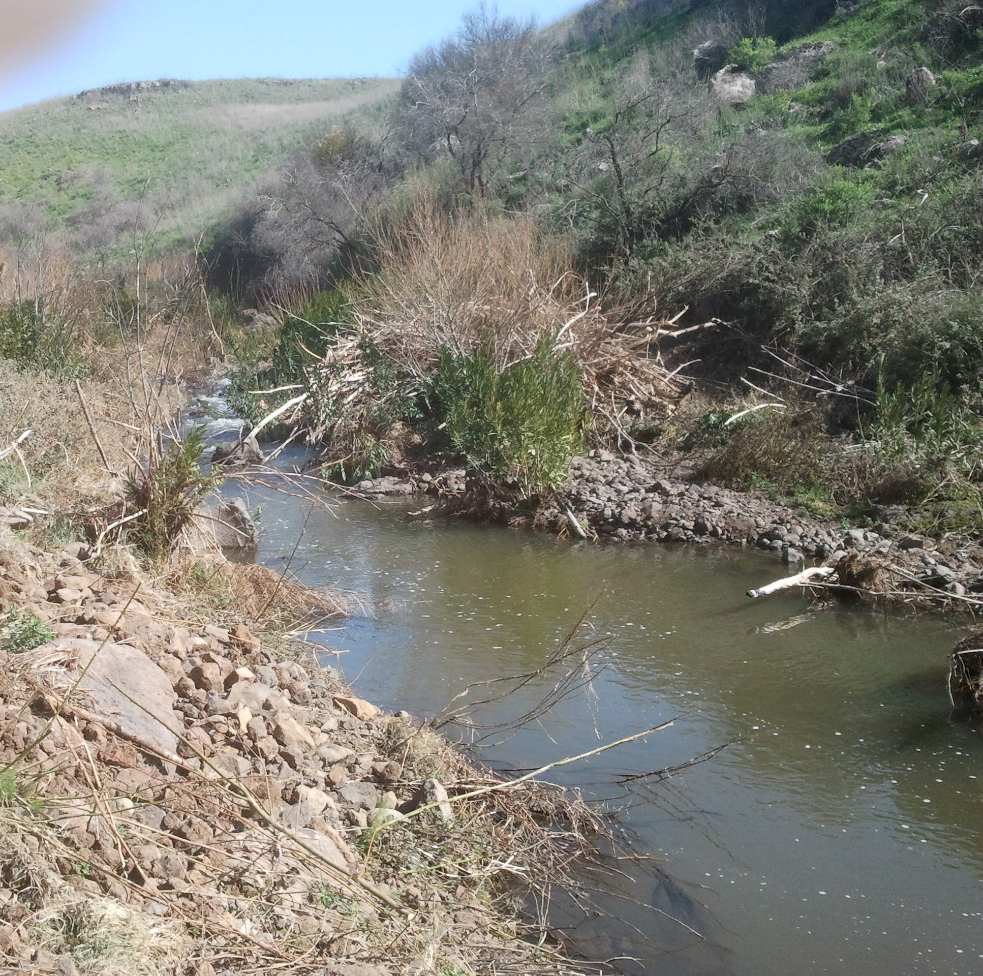 נחל בזלת באזור שמורת גמלא